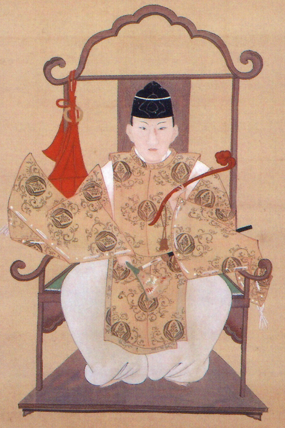 毛利匡広の肖像。